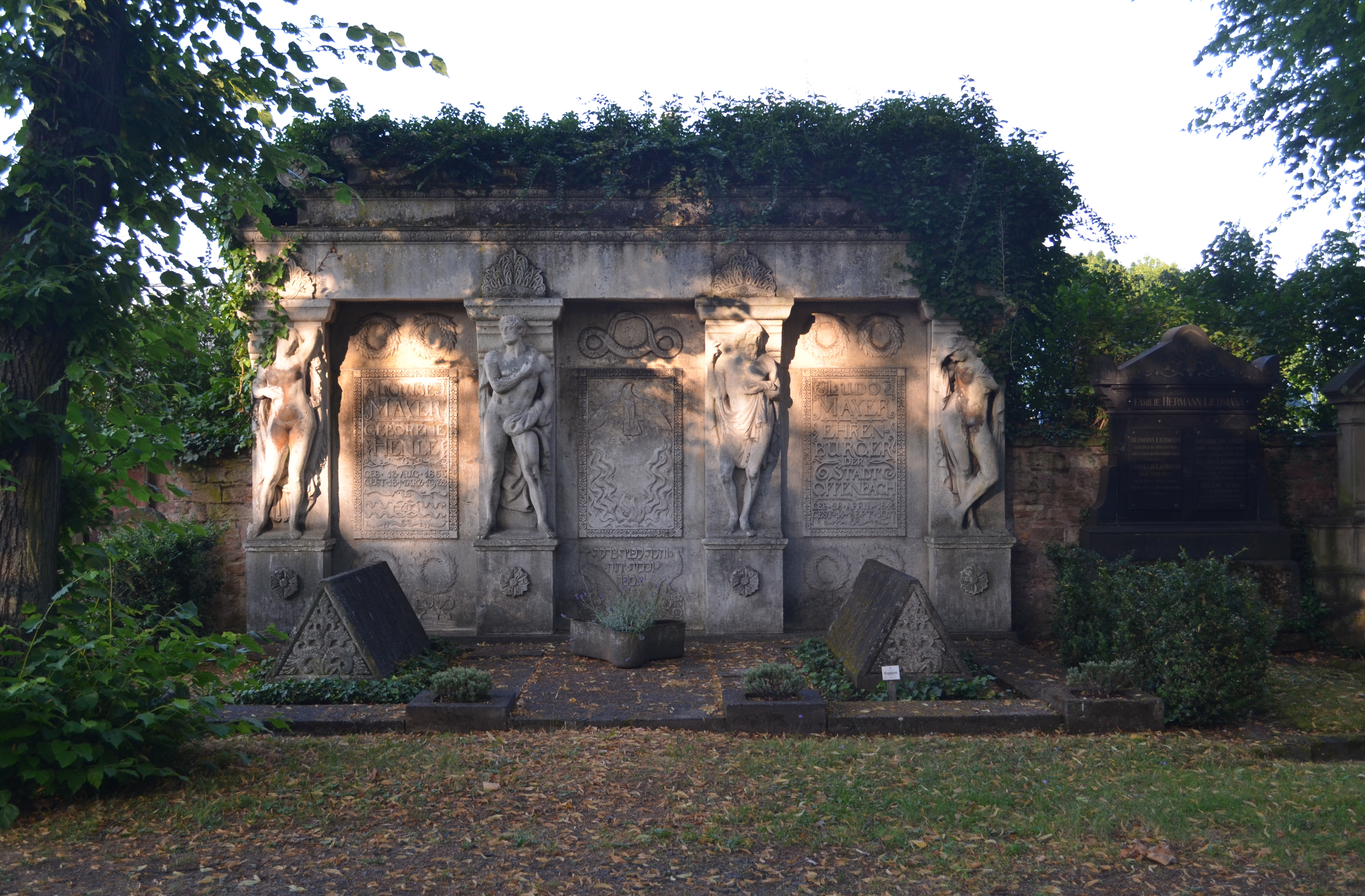 Offenbach, Alter Friedhof, Grab Ludo Mayer